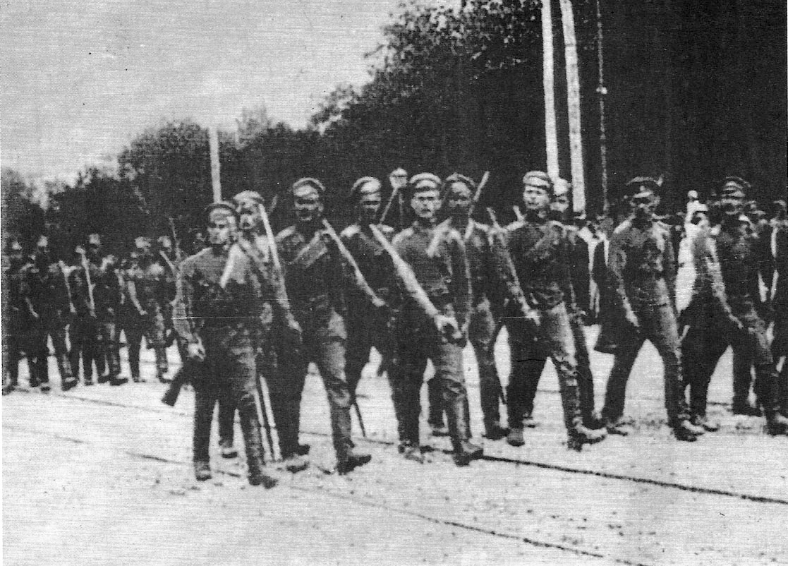 Войска генерала Н.Э. Бредова входят в Киев на Софийскую площадь, 31 августа 1919 г.